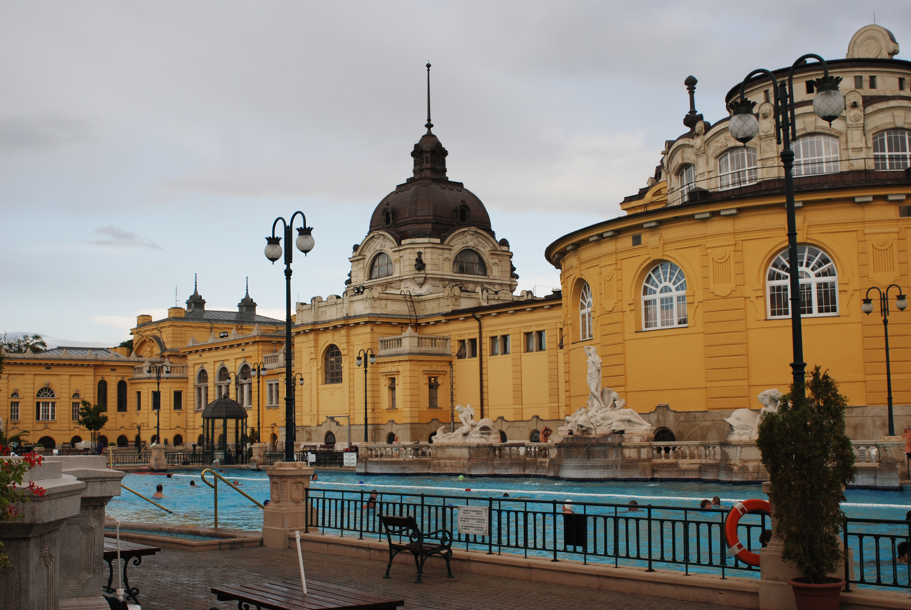 Budapest thermal spa Széchenyi Gyógyfürdő. Outside pool.